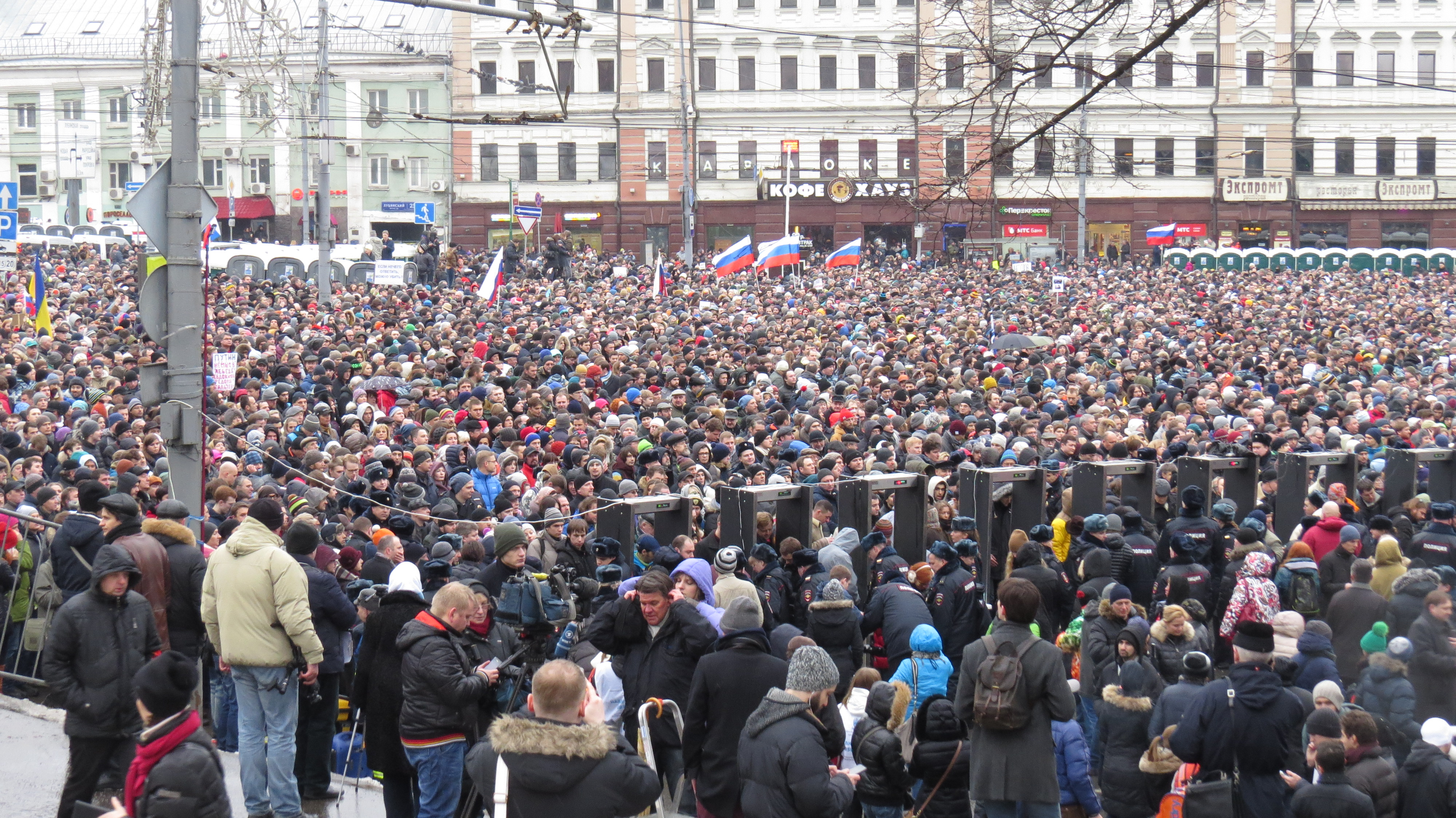 Марш памяти Бориса Немцова в Москве.